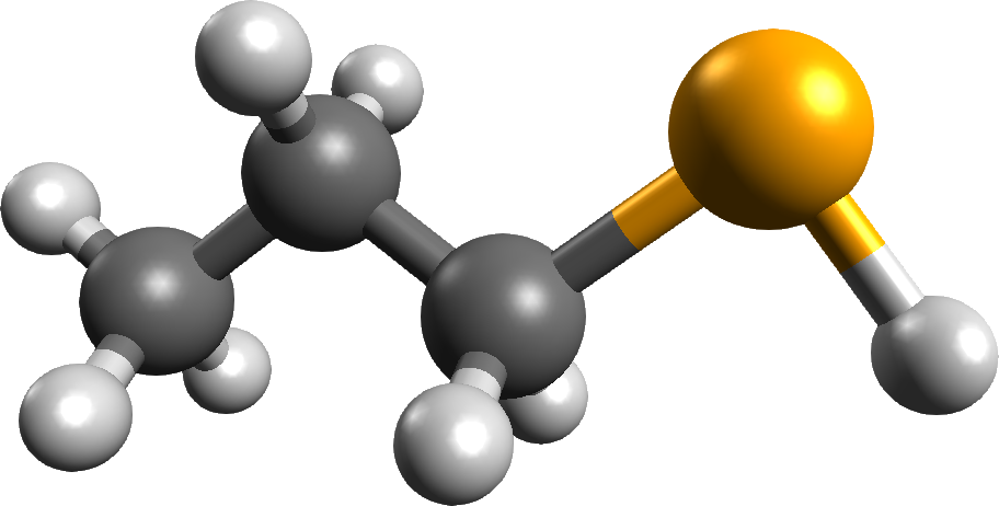 正丙硒醇 結構